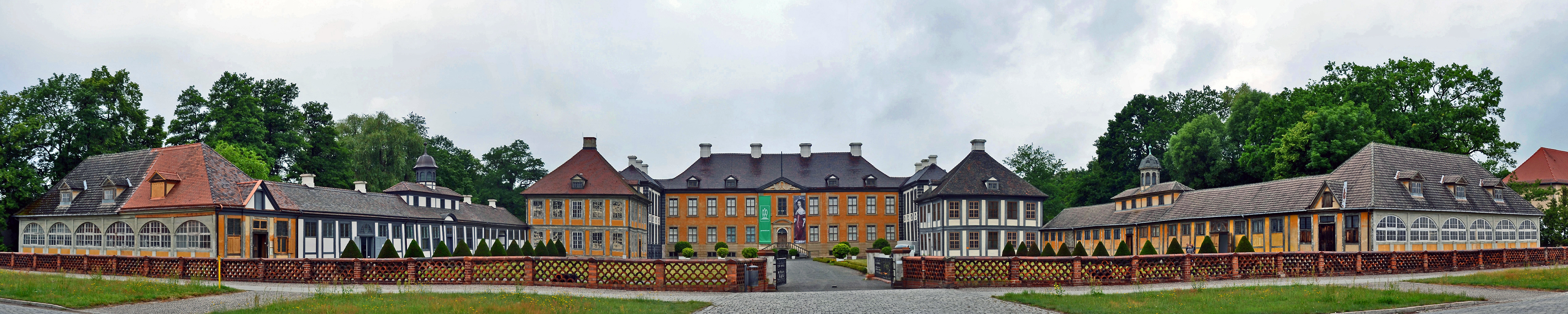 Schloss Oranienbaum - Juni 2016